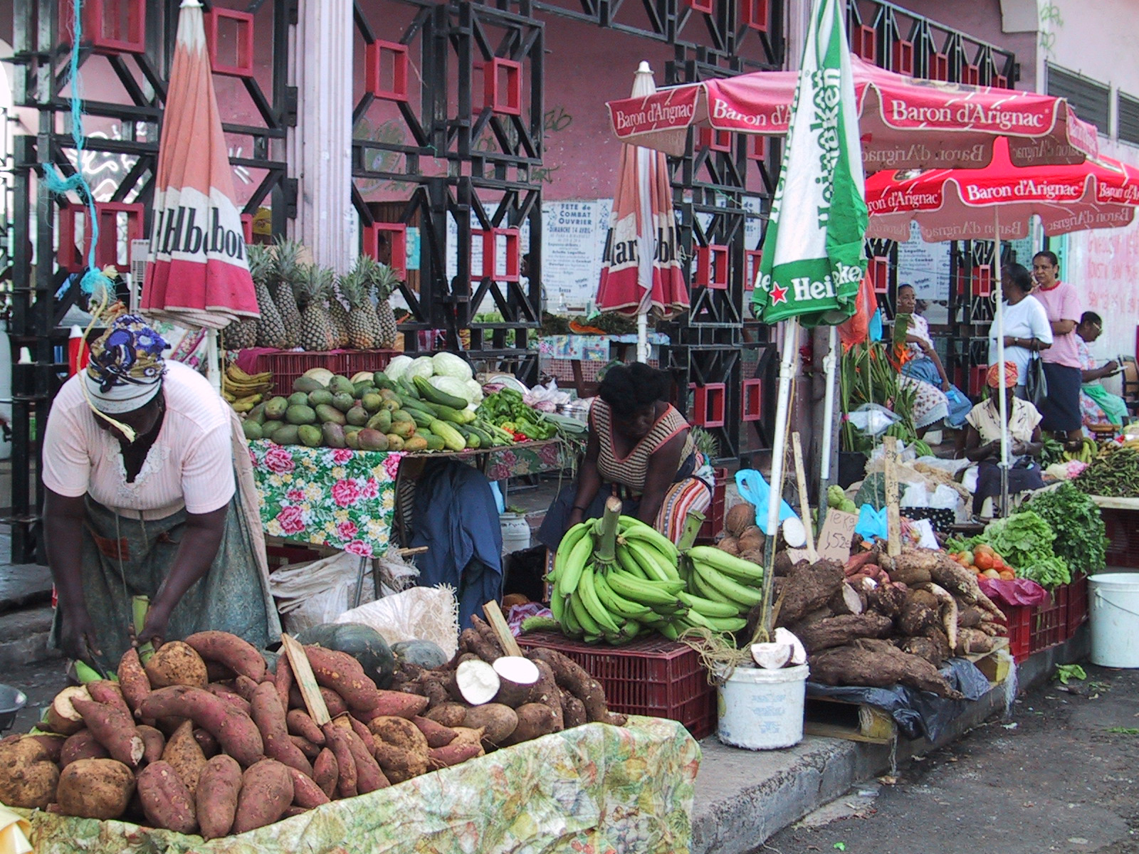 marché de Pointe-à-Pitre en Guadeloupe - Marked i Pointe-à-Pitre en Guadeloupe-2002